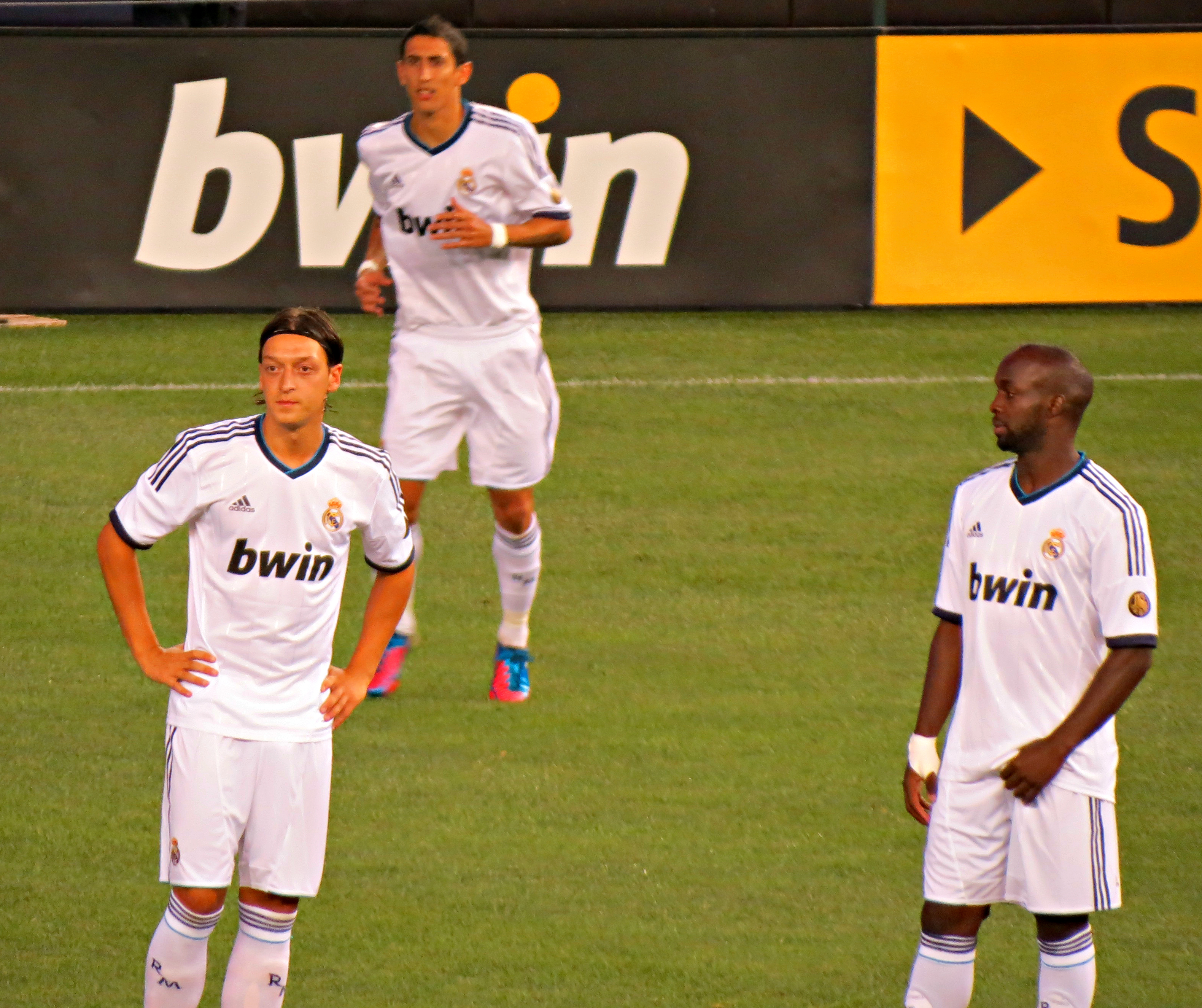 Mesut Ozil, Angel Di Maria and Lassana Diarra.